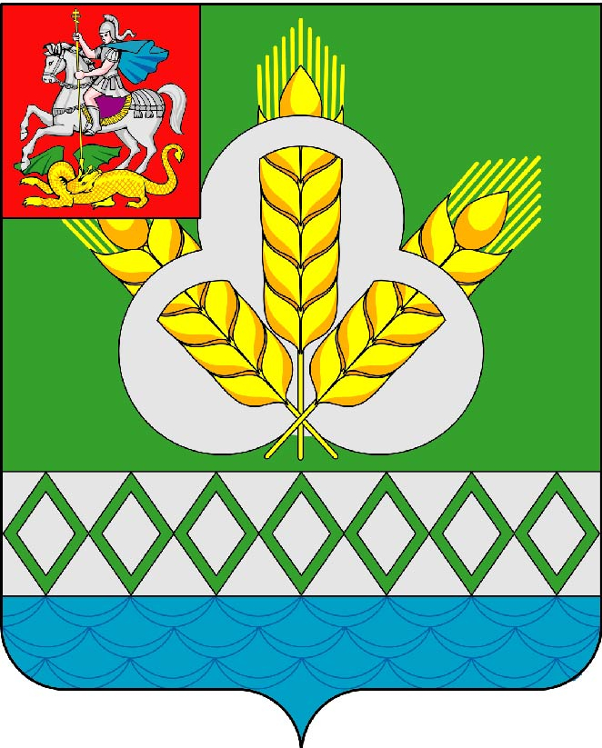 Герб города Озеры